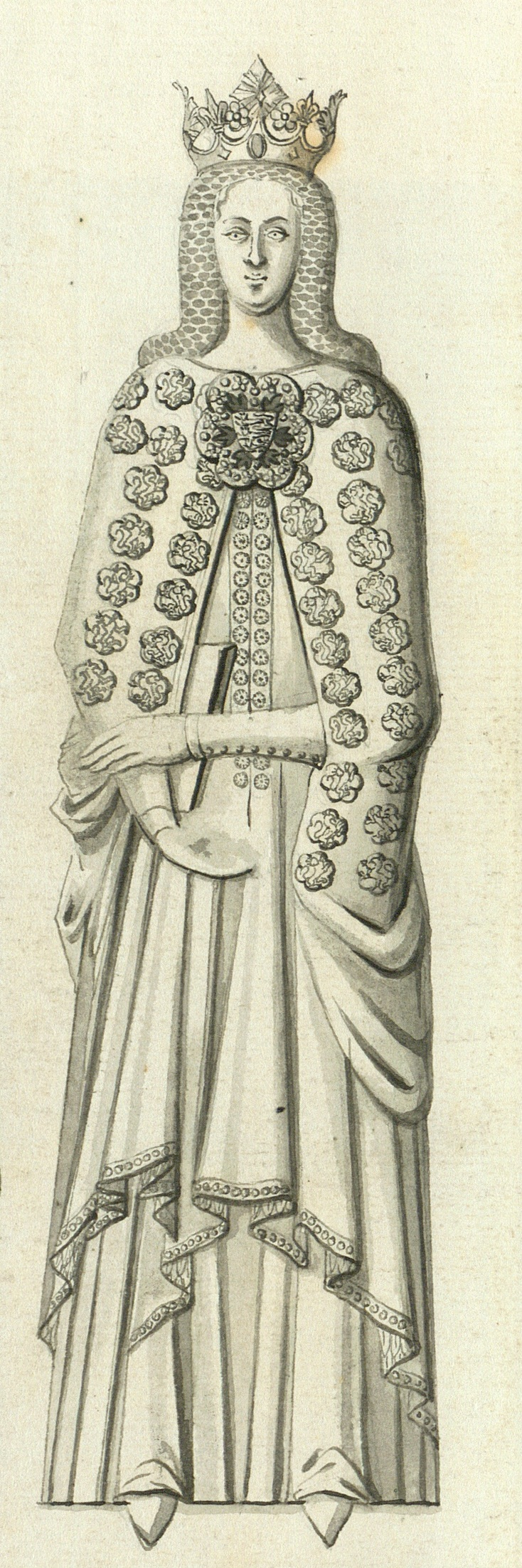 Dronning Eufemia, Bronzemonument, Sorø Klosterkirke.